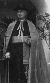 Jan Nevěřil (1864 - 1940), Český římskokatolický kněz, teolog a pedagog.